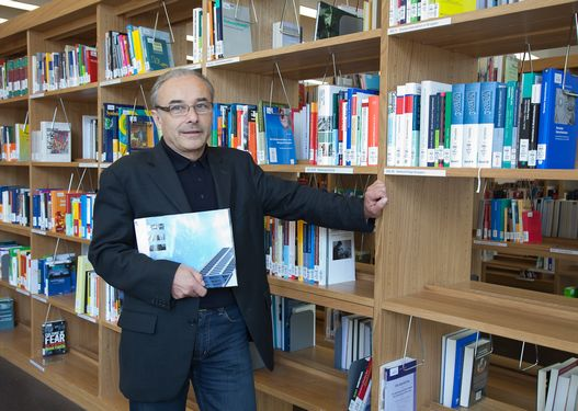 Direktor der Oberösterreichischen Landesbibliothek Dr. Christian Enichlmayr